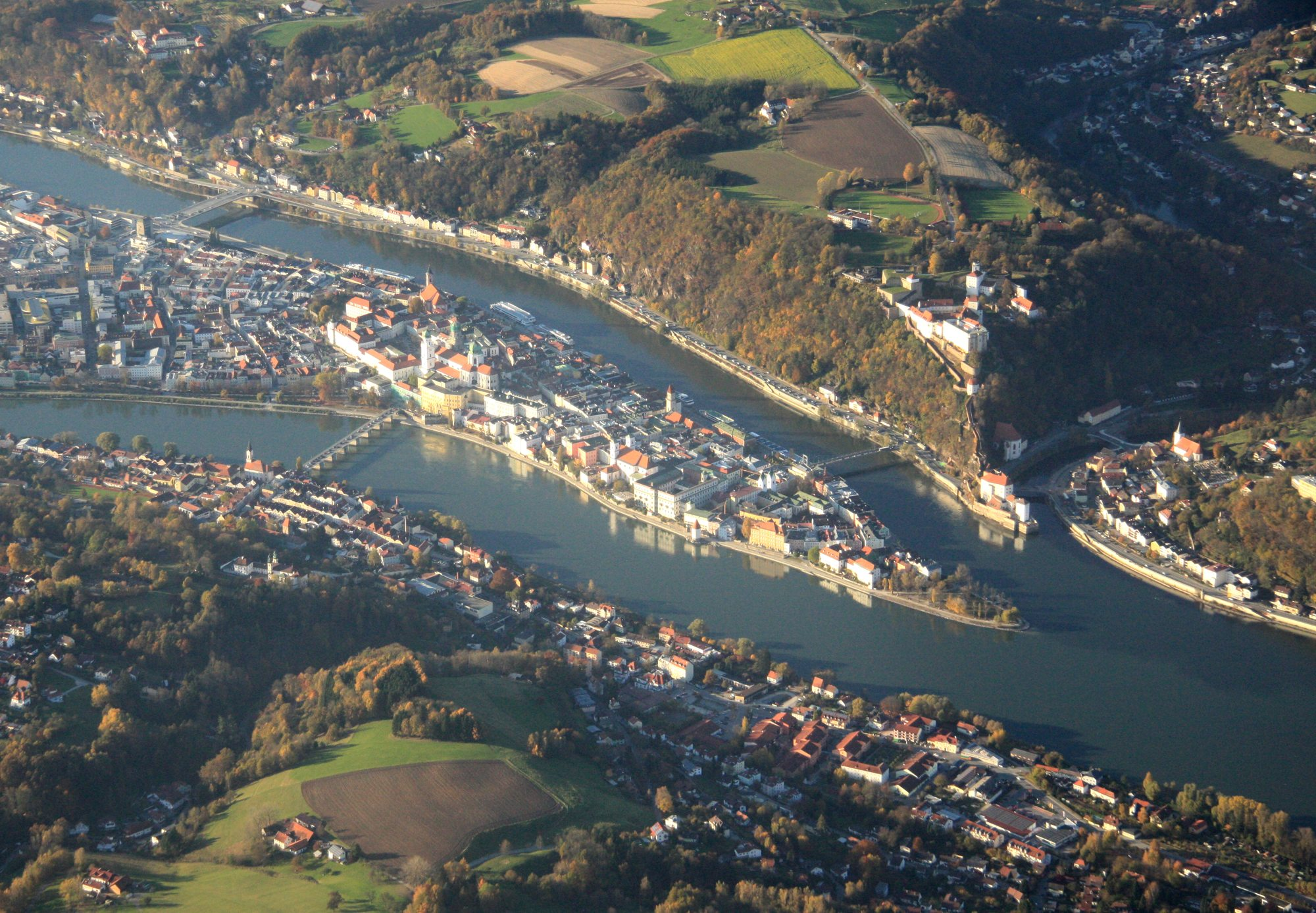 Passau